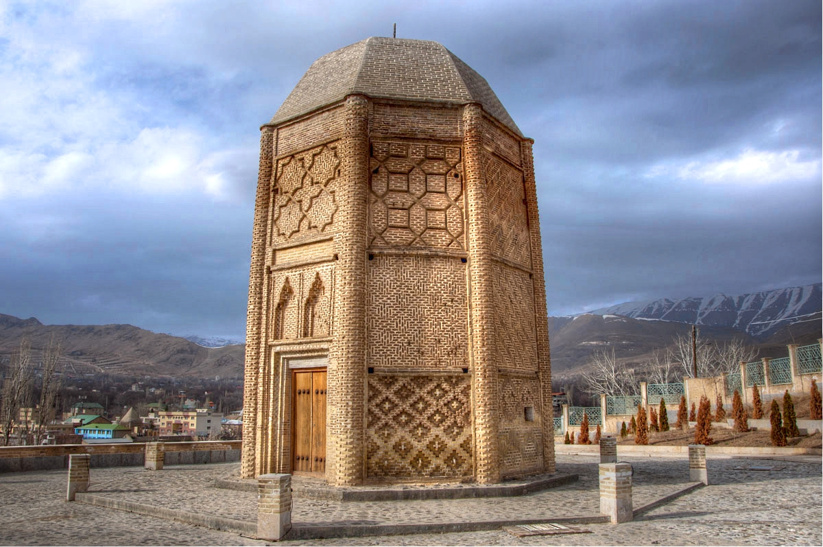 برج شبلی